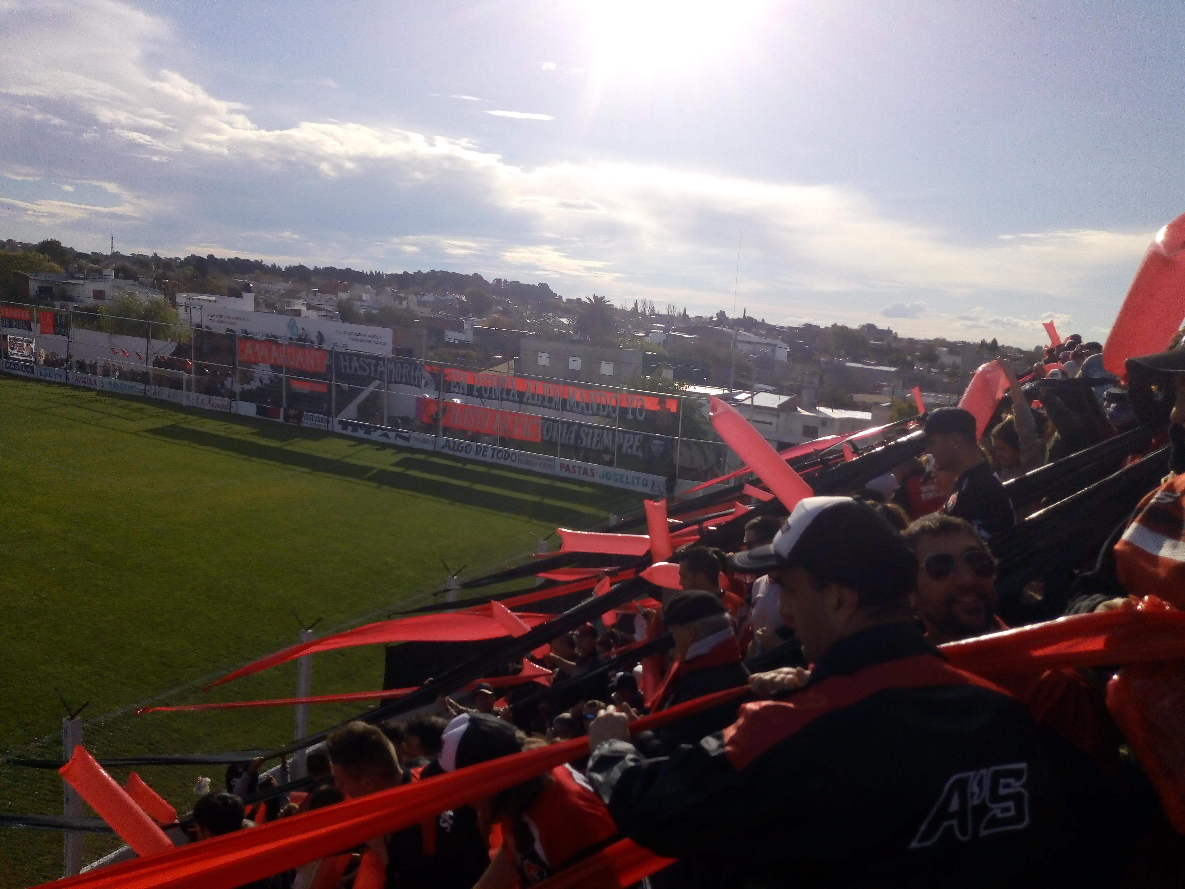 Hinchas de Sporting en la tribuna visitante, sobre la calle Estrada.